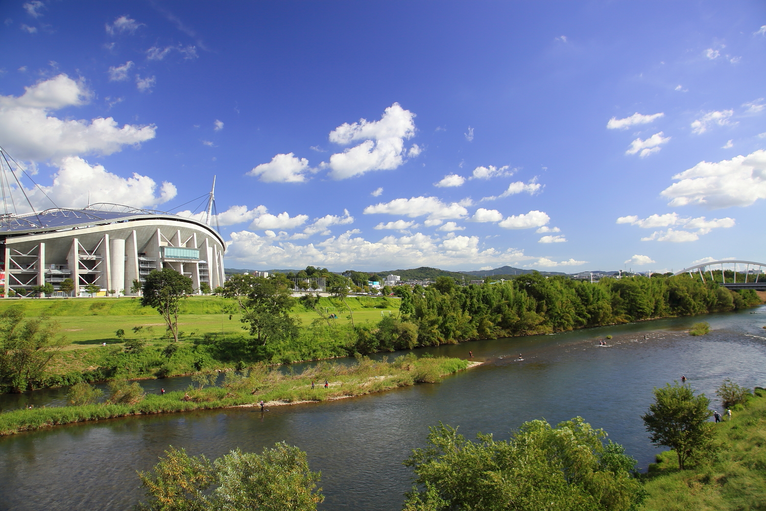 豊田大橋から望む矢作川と豊田スタジアム（豊田市白浜町、2011年）